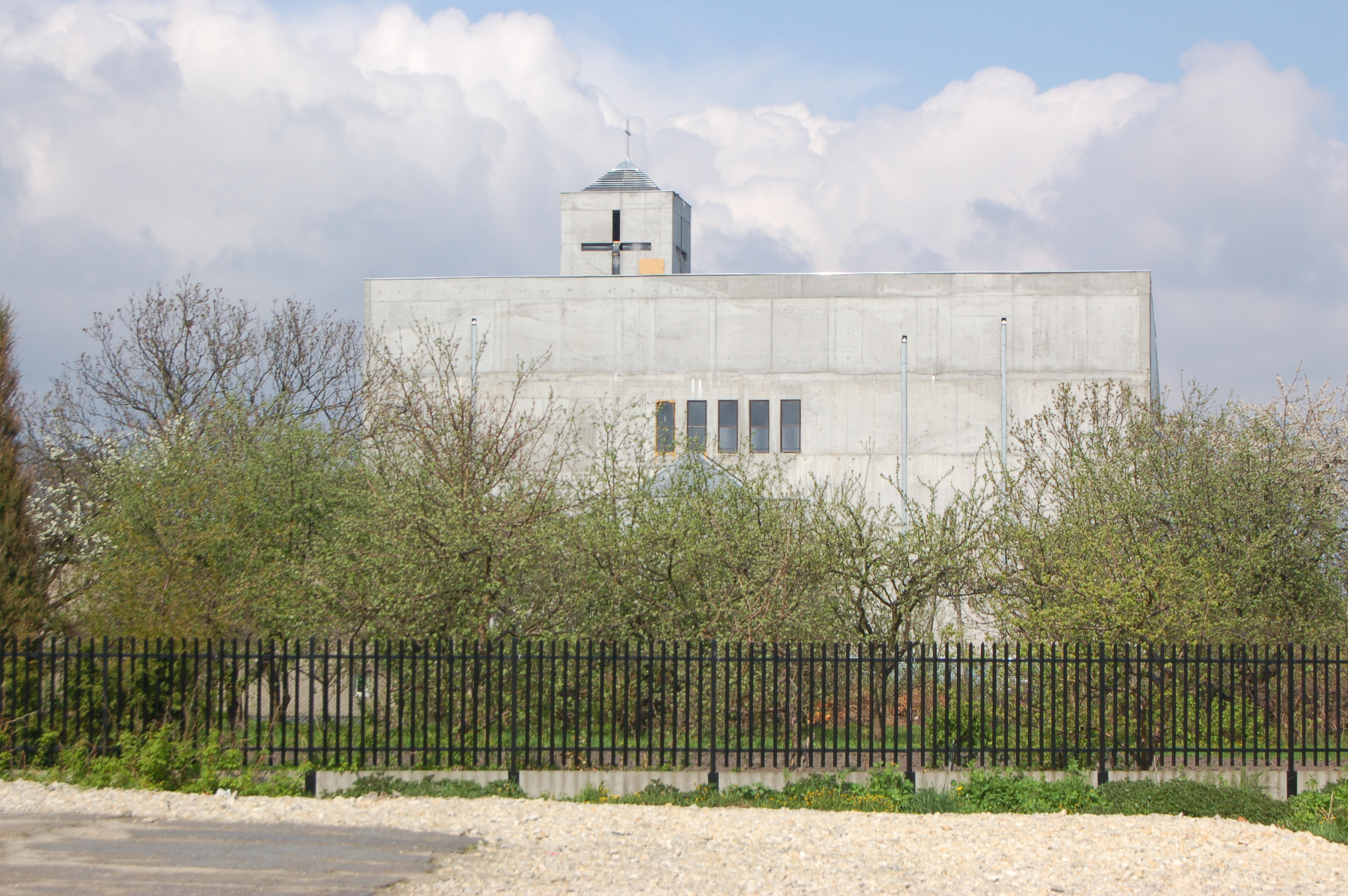 Neubau der Kaplica Bl. Edmunda Bojanowskiego (Warschau-Ursynow)